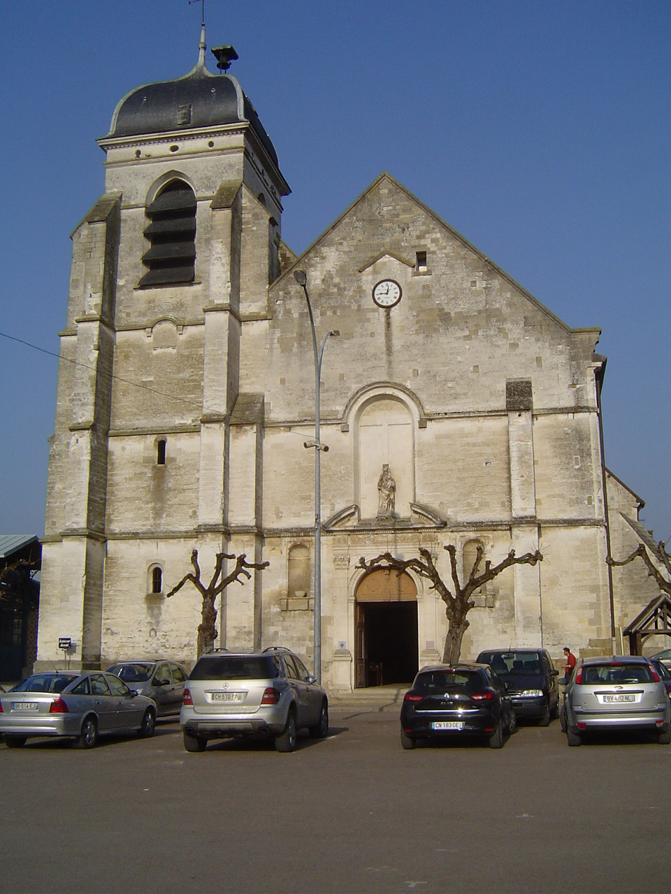 Aix-en-Othe - L'église